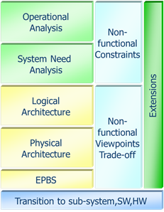 Décomposition en phase d'ingénierie